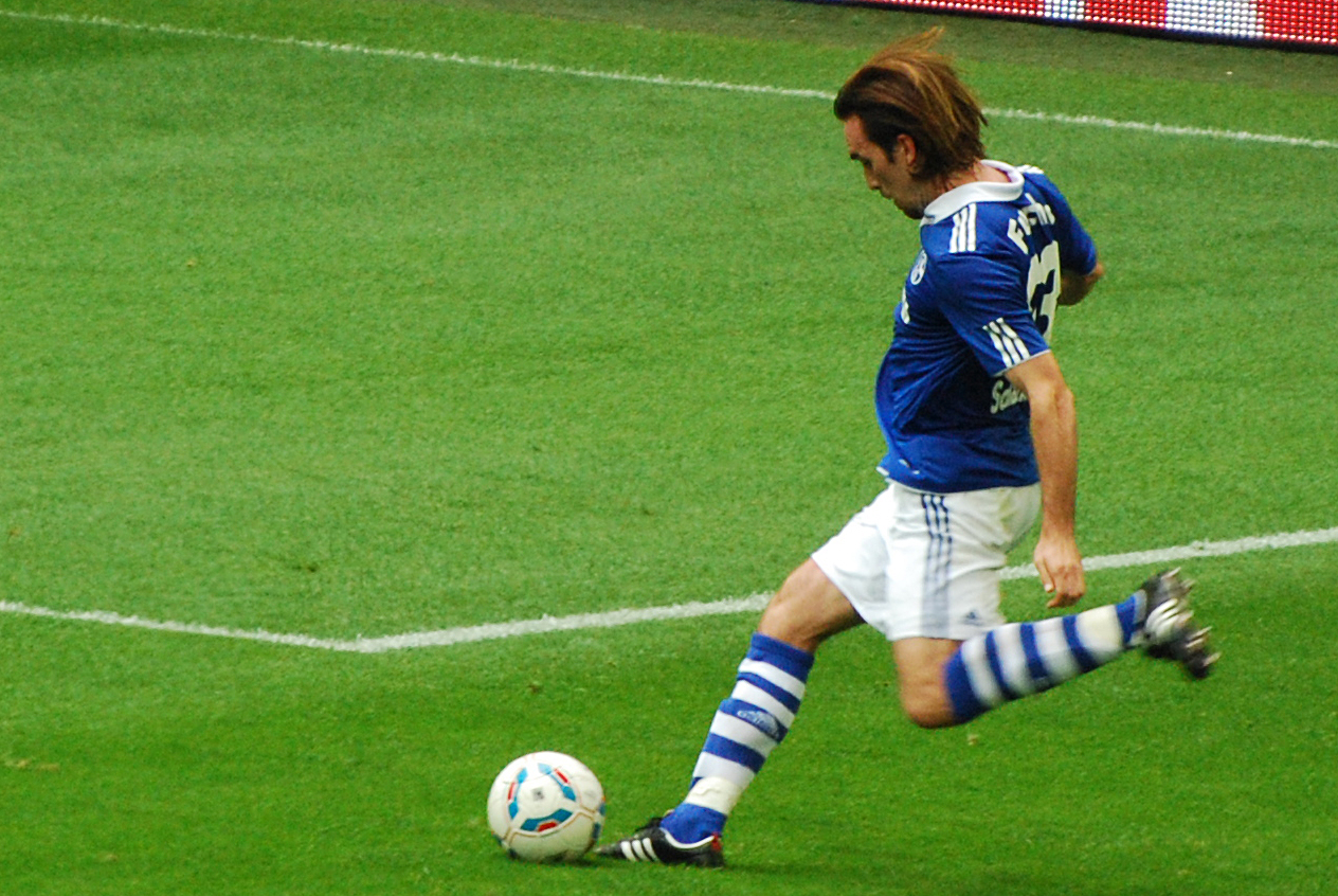 Christian Fuchs, Spieler des FC Schalke 04, bei der Ausführung eines Freistoßes.